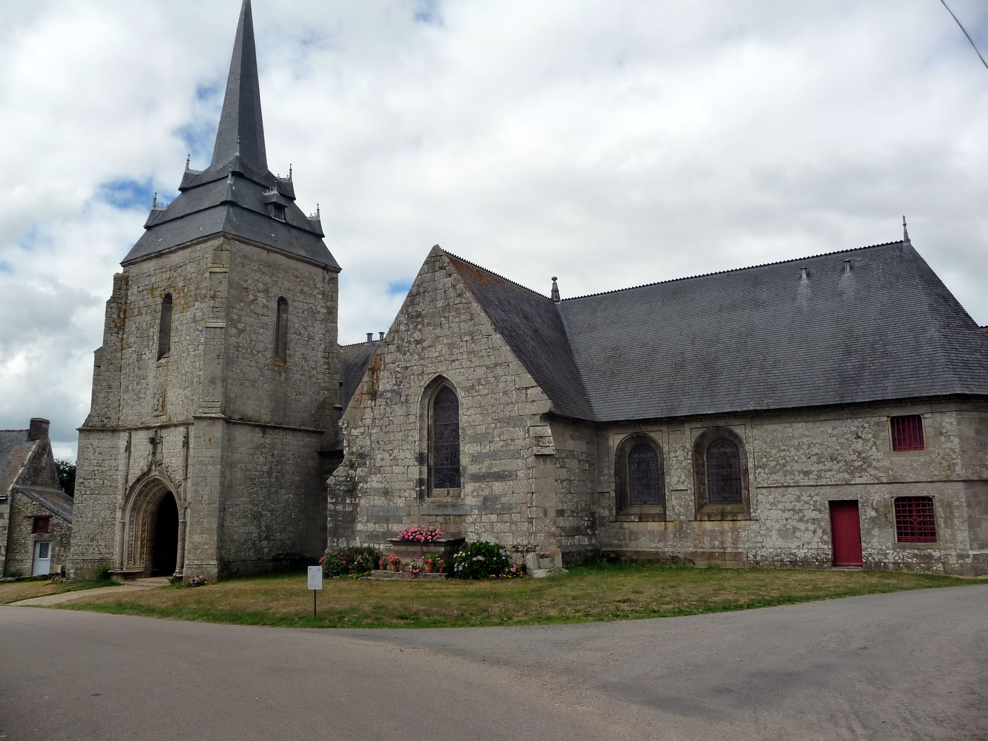 Chapelle Notre-Dame-de-Carmès et sa fontaine, Carmès (Classé, 1980) .